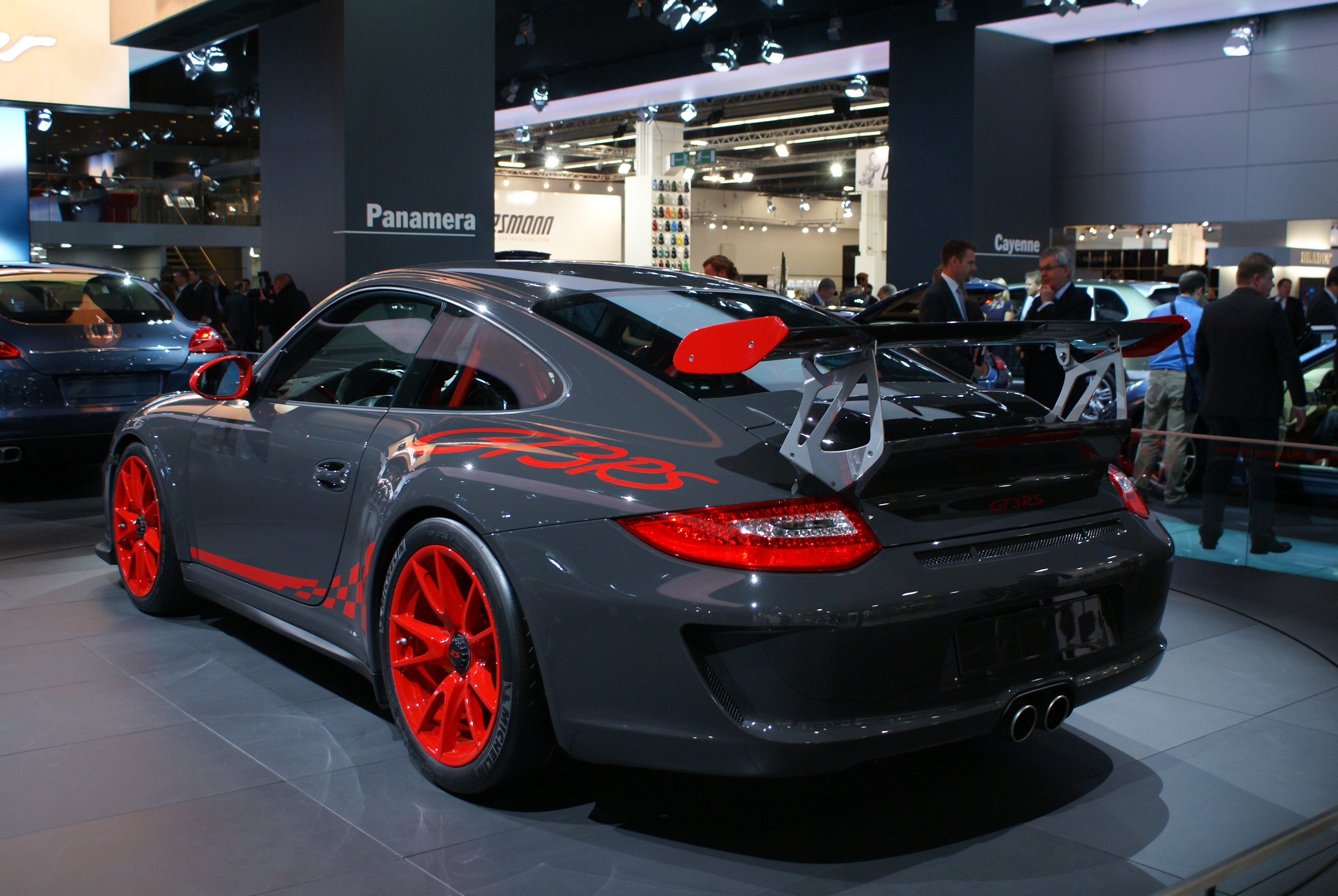 Porsche 911 GT3 RS (997 facelift)